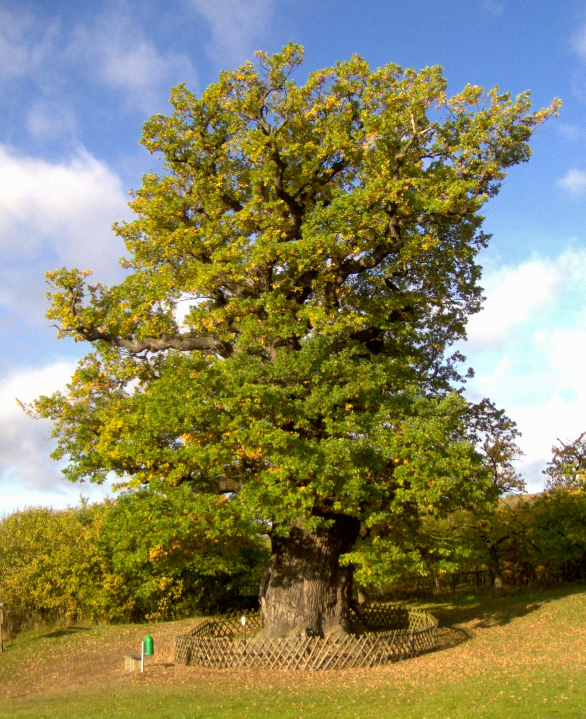 Volkenrodaer Königseiche am 20. Oktober 2006. Eigene Fotografie.